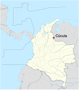 Harta cu amplasarea localitatii Cucuta, Columbia